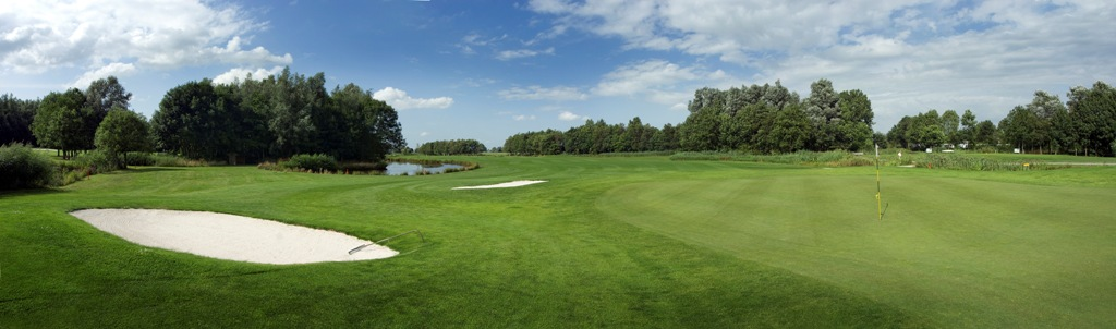 Foto van Hole 6 van de Griendbaan